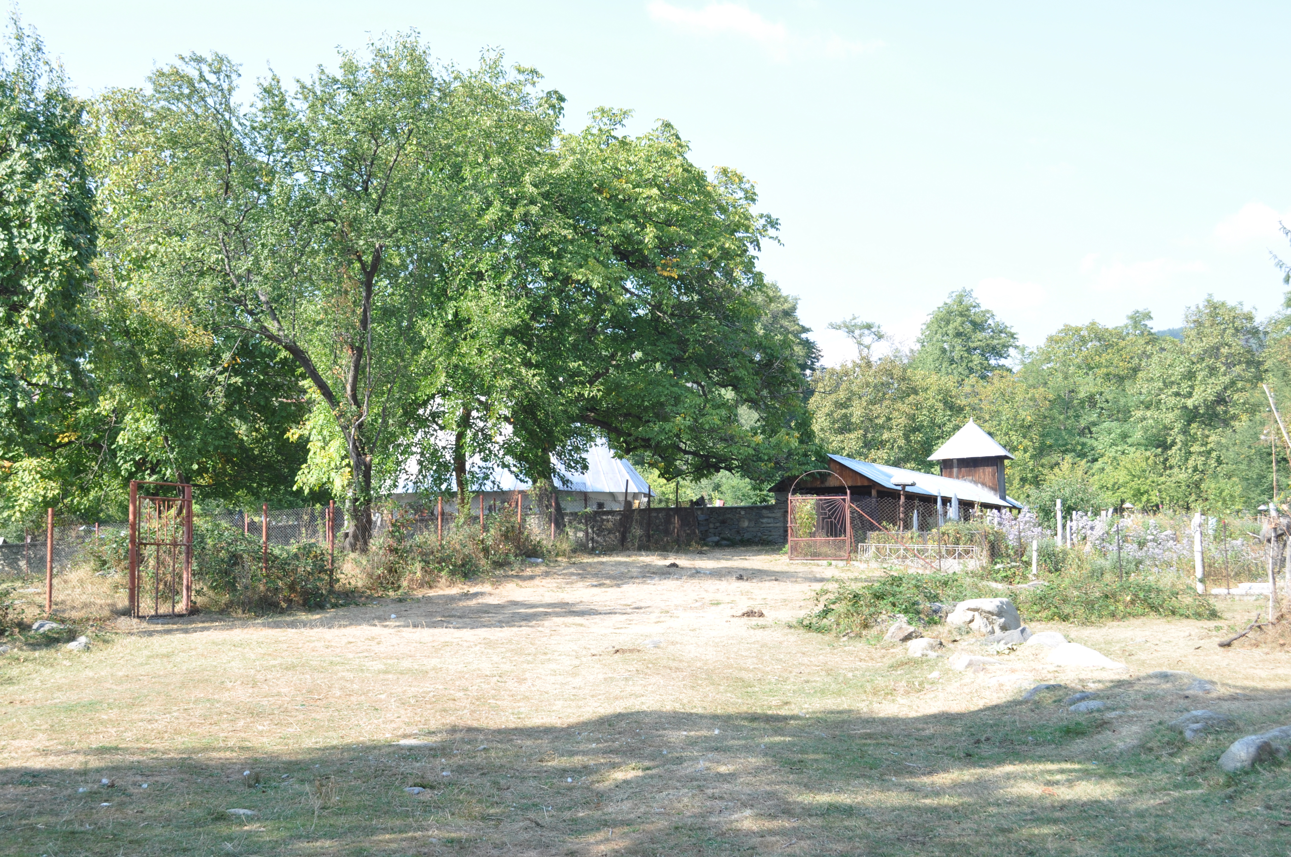 Biserica de lemn Intrarea în Biserică a Maicii Domnului din Cărpiniș, Gorj 01